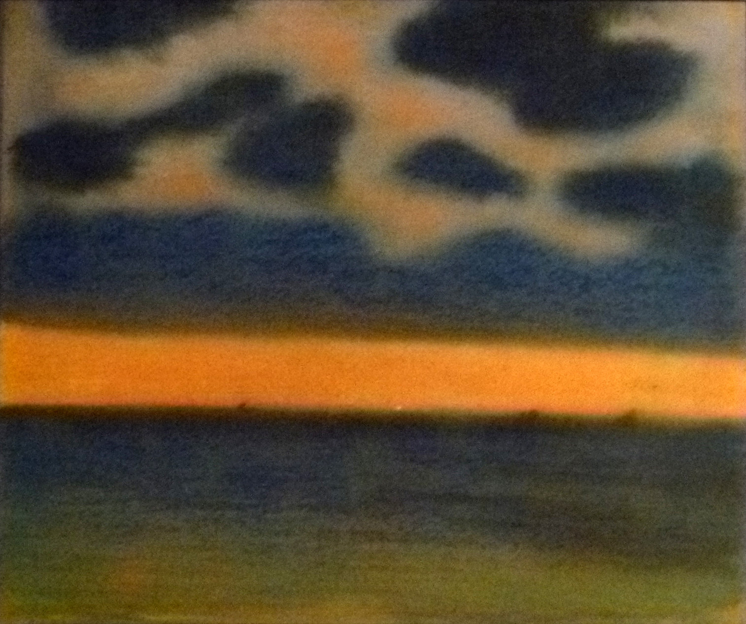 "Blauw-rode marine" (1906); pastel en krijt op papier door de Belgische kunstenaar Léon Spilliaert; privébezit